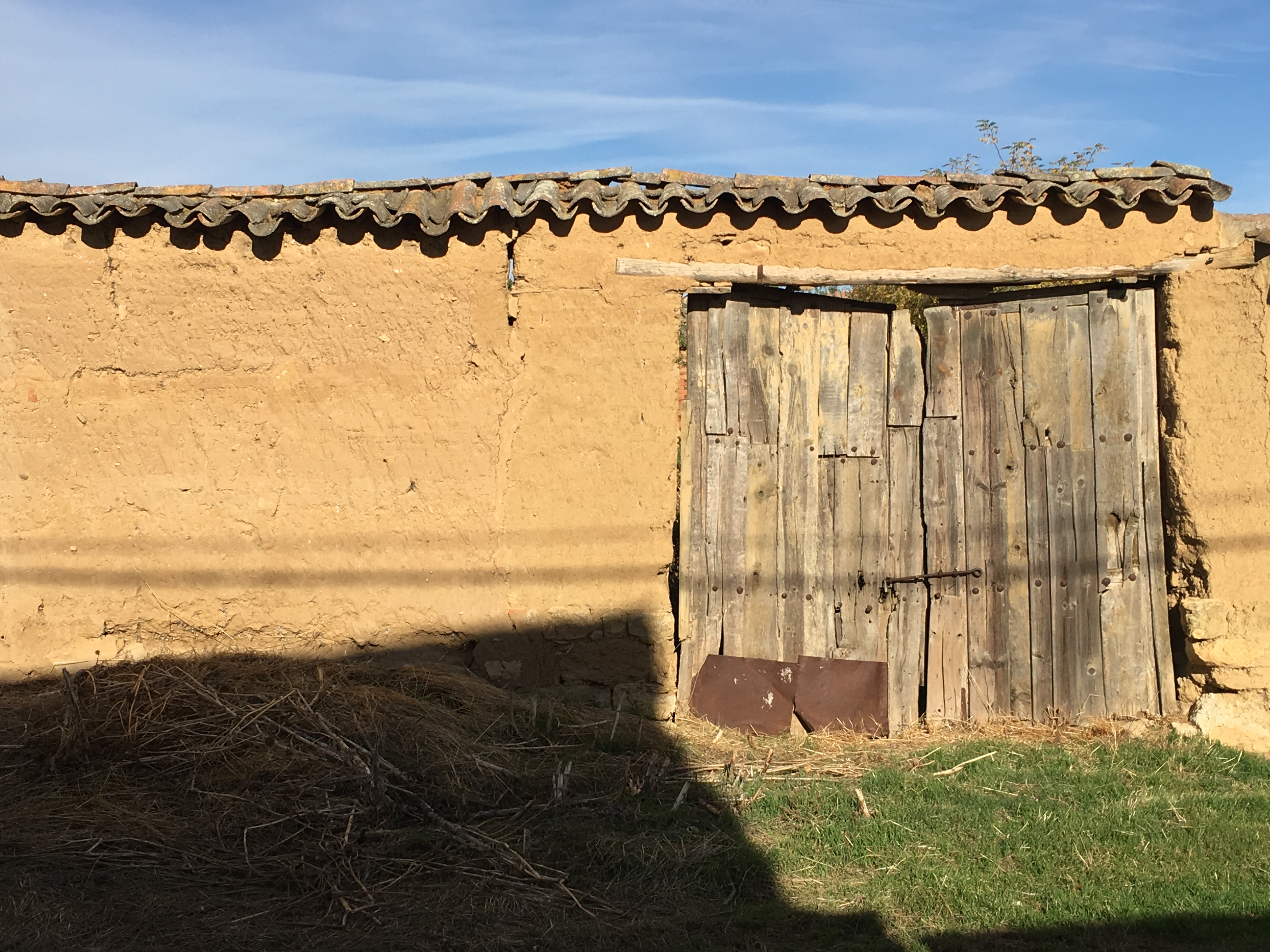 Villaesper Milenario